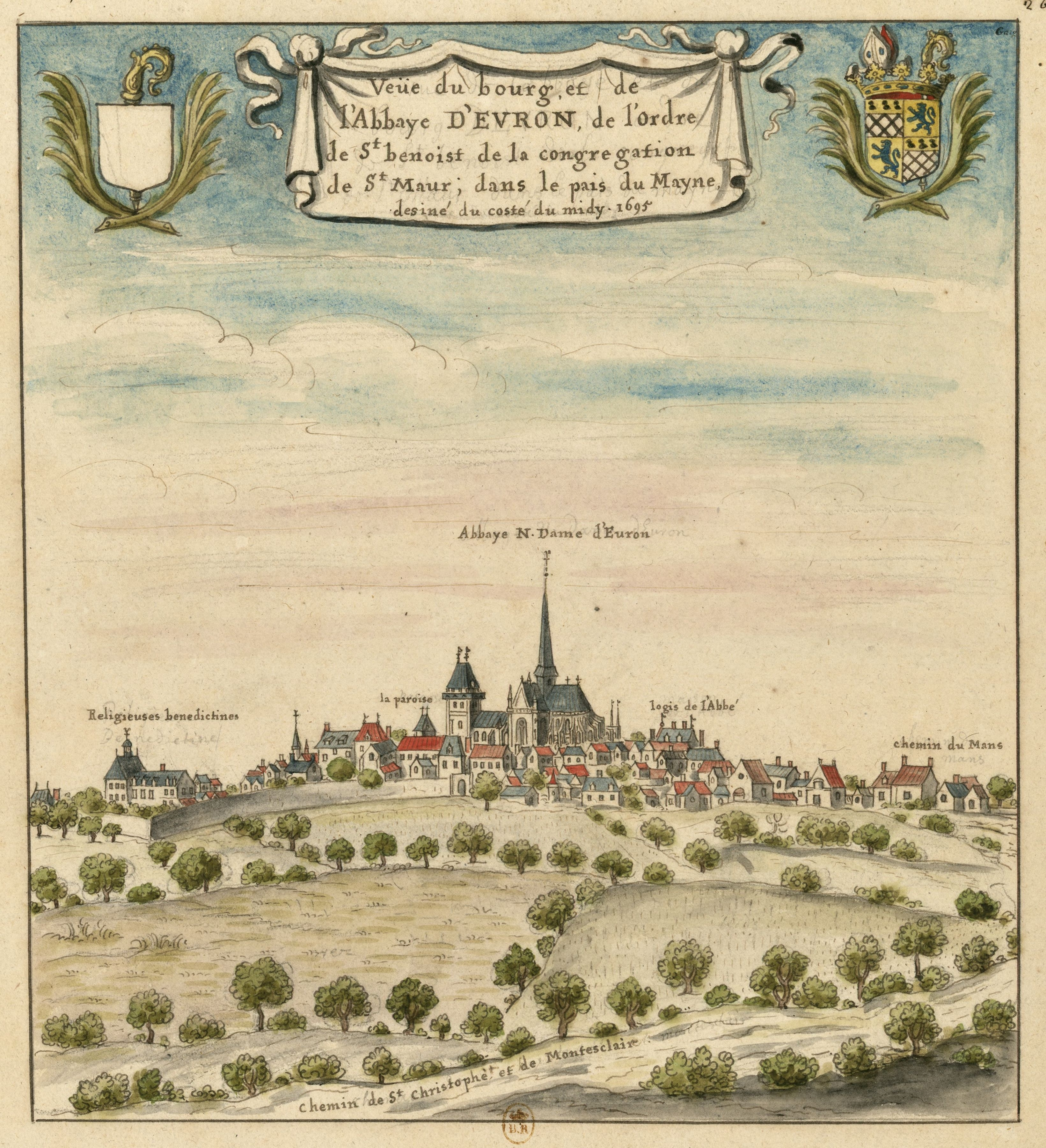 dessin corrigé relevé pour Gaignières, conservé à la BNF et téléchargé par Gallica.